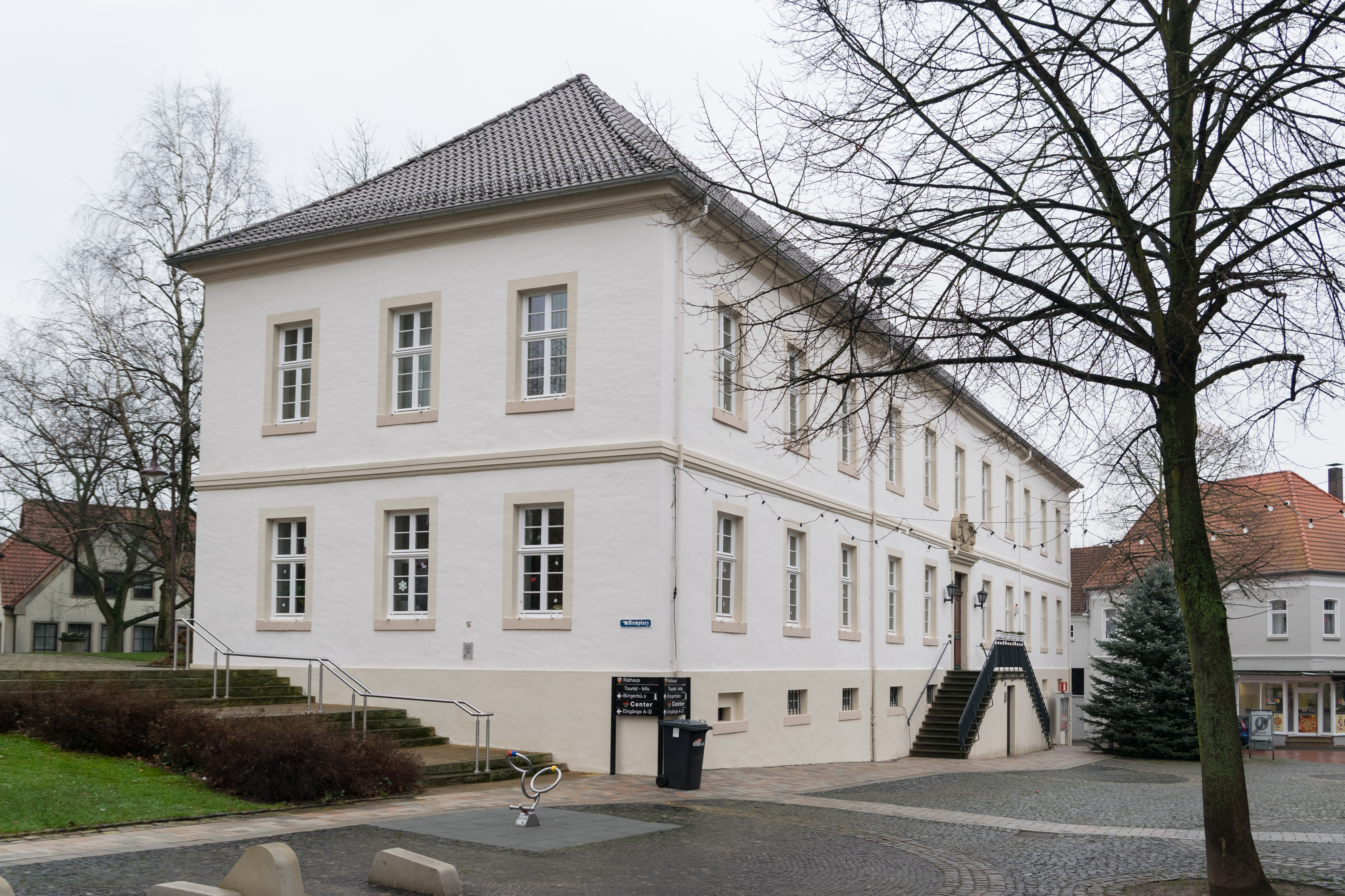 This image shows a heritage building in Germany, located in the North Rhine-Westphalian city Steinheim (Westfalen) (no. 23). Altes Rathaus Steinheim